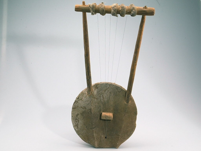 Deze lier heeft een schaalvormige klankkast van hout, bedekt met leer. Het driehoekige frame bestaat uit 2 armen in V-vorm en een dwarsstok (juk). De 5 snaren lopen binnen dit frame via een kam naar het juk, waar ze gespannen worden door middel van repen stof die rond het juk gewonden zijn.